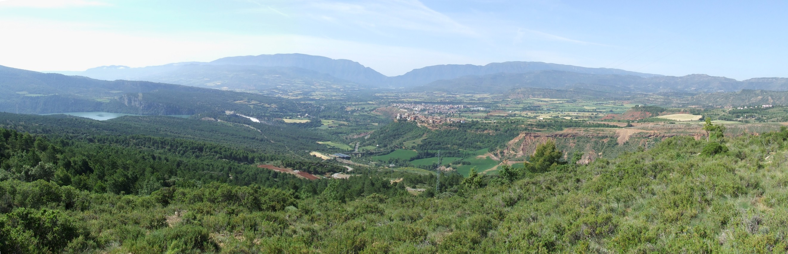 Panoràmica de la Conca Deçà (Pallars Jussà)